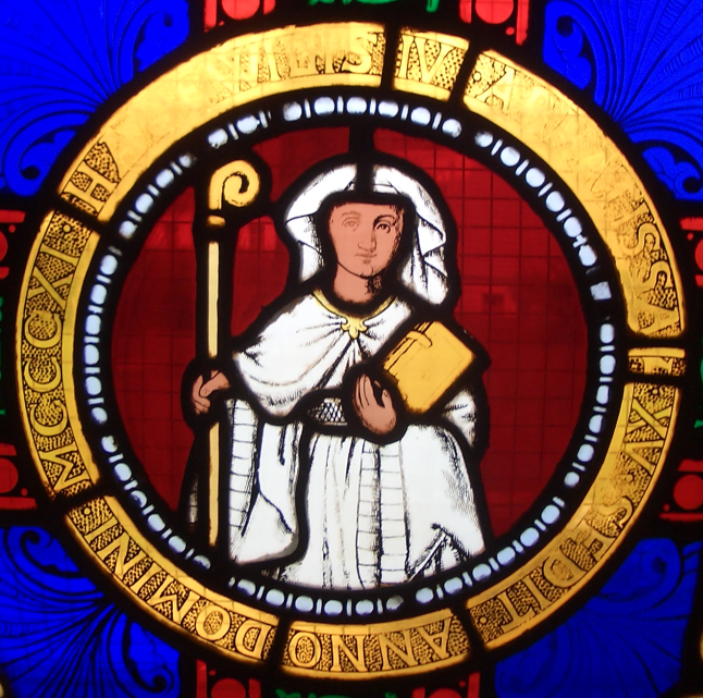 Äbtissin Hedwig IV. nach dem Kirchenfenster der Stiftskirche Gernrode